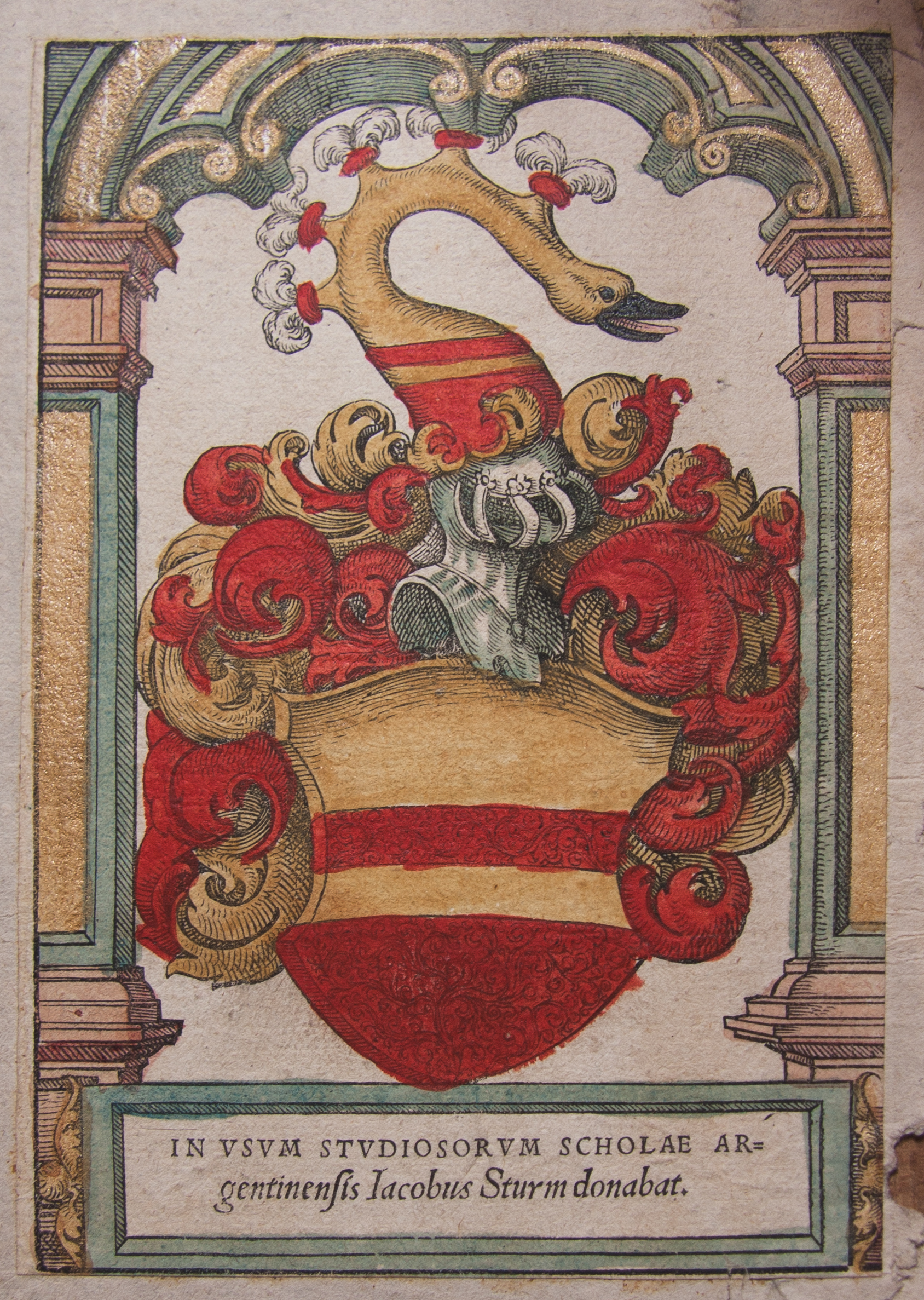 Ex-dono de Jacques Sturm, trouvé sur un contre-plat d'un recueil des oeuvres de Clément d'Alexandrie datant de 1550. L'ex-dono a été effectué de toute évidence par le Collège Saint-Guillaume - coll. Médiathèque protestante de Strasbourg.